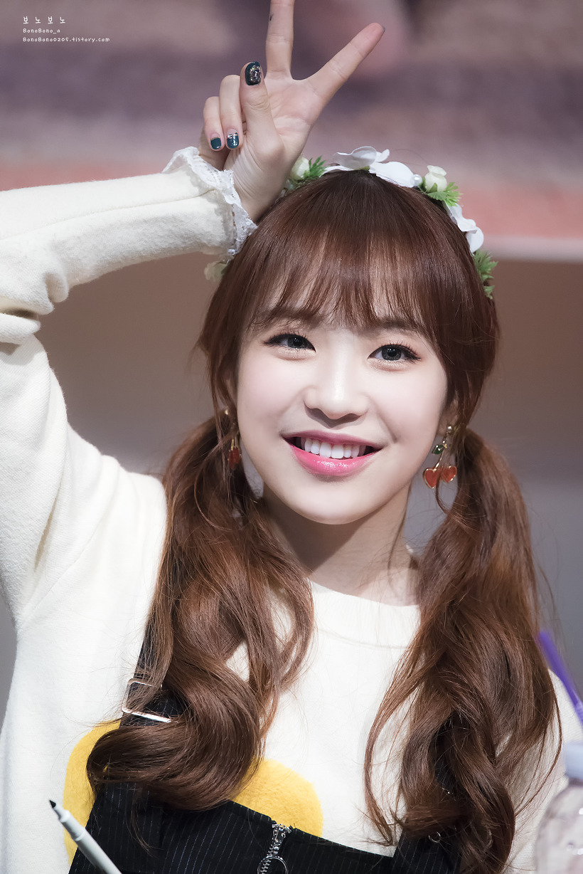 181020 에이프릴 중구팬싸인회